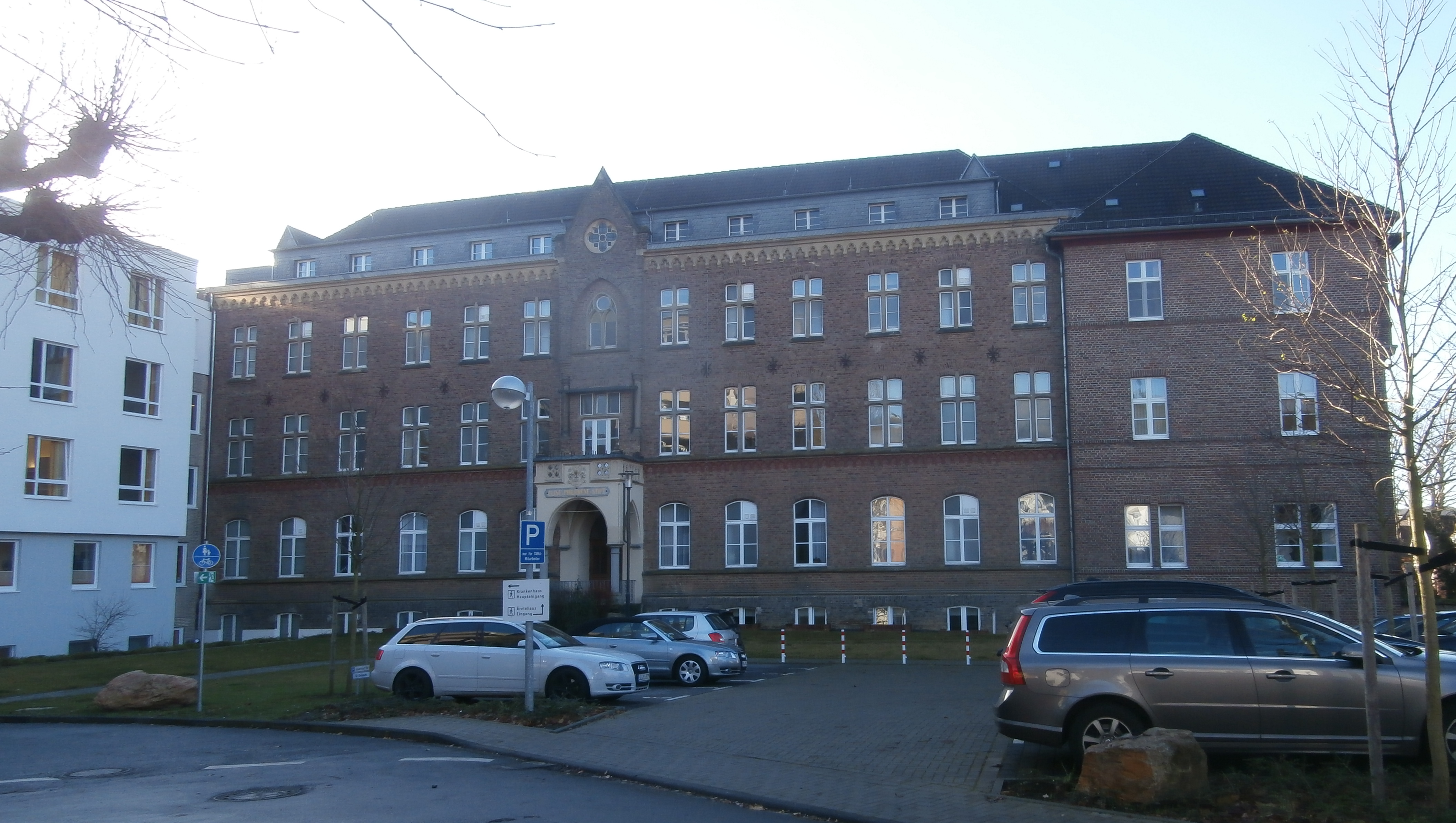 Katholisches Krankenhaus im Siebengebirge, Schülgenstraße 15, Bad Honnef: Altbau (erbaut 1886–1888)